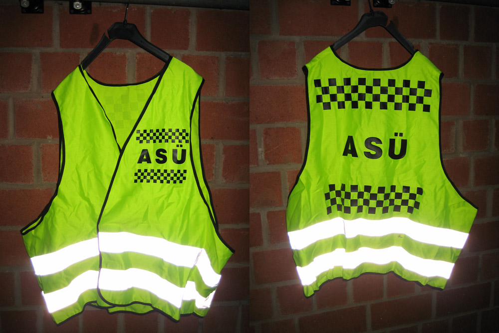 Möglichkeit zur Kennzeichnung der Atemschutzüberwachung